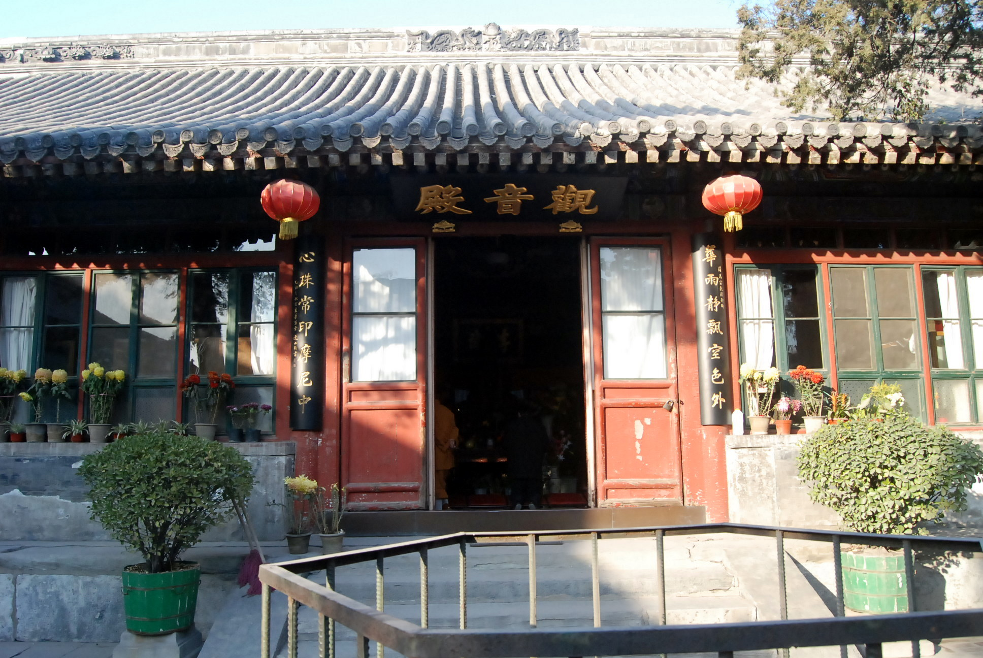 法源寺观音殿